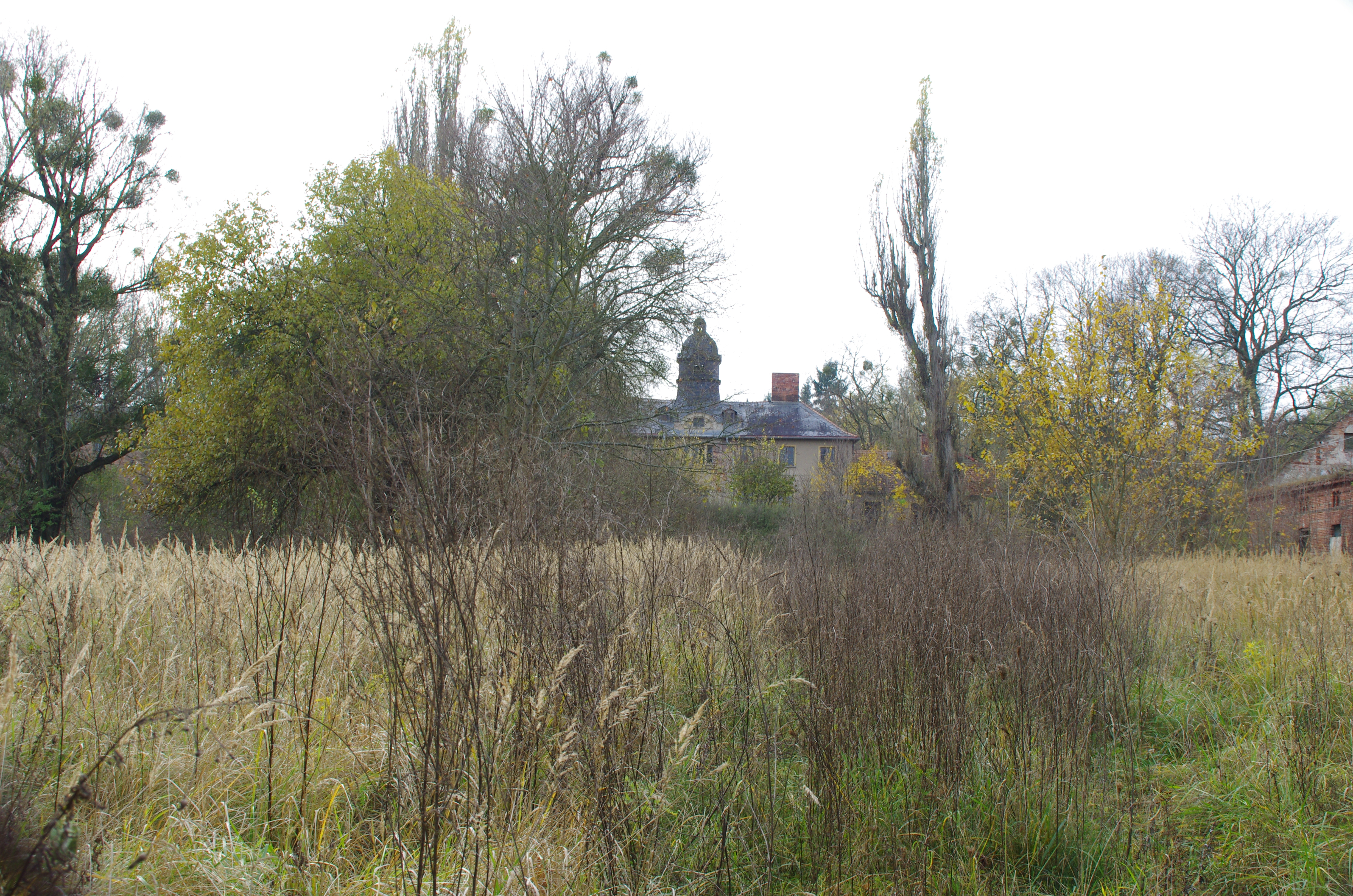 Bad Freienwalde in Brandenburg. Das Gut Sonnenburg im Ortsteil Sonnenburg steht unter Denkmalschutz und zerfällt.